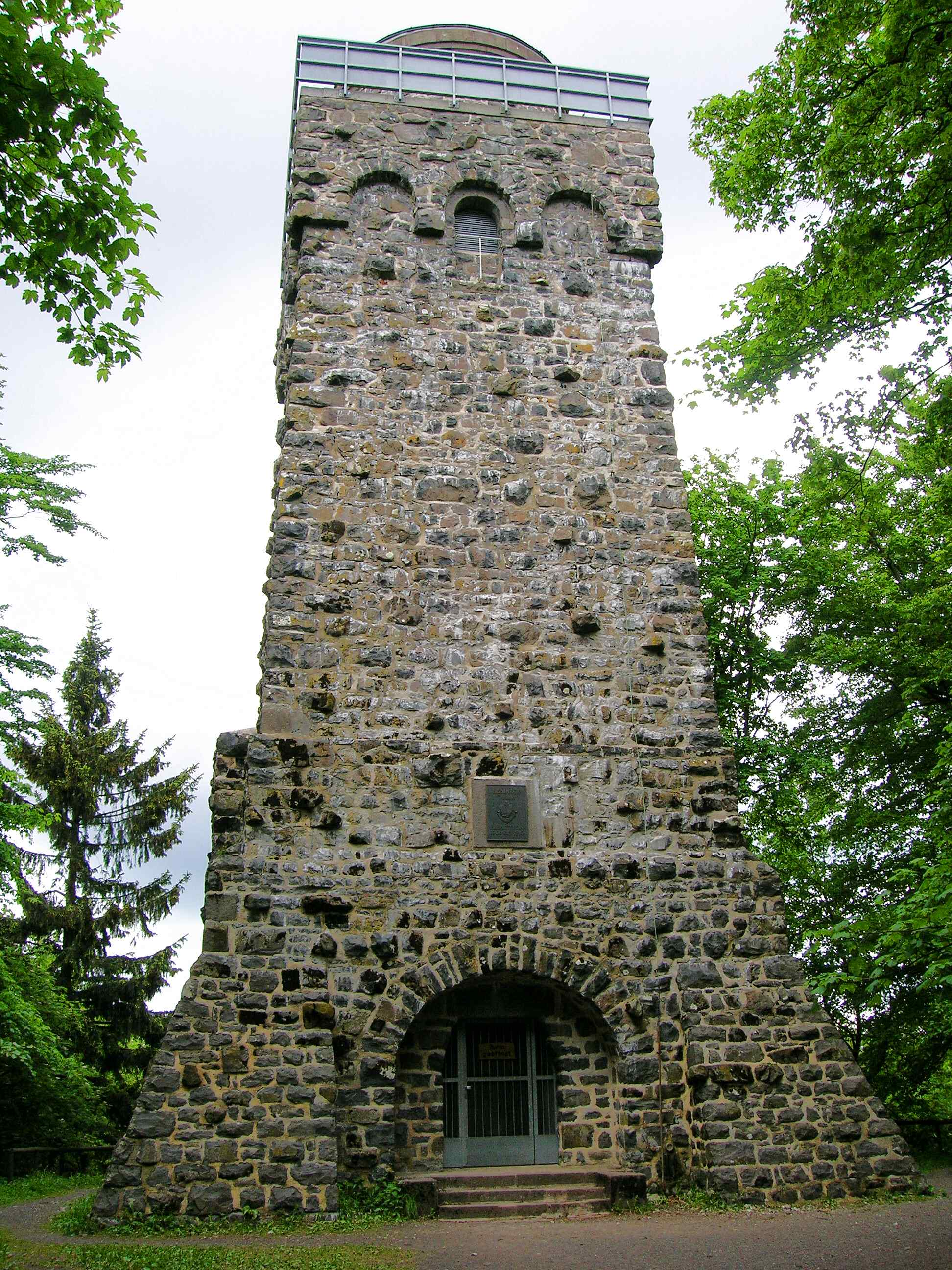 Der Bismarckturm am Taufstein/Vogelsberg Vorderansicht; Guter Aussichtspunkt